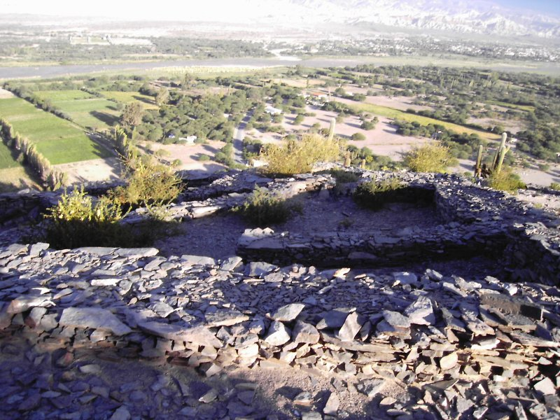 Pucará at Cerro Pintado, Santa María del Yokavil